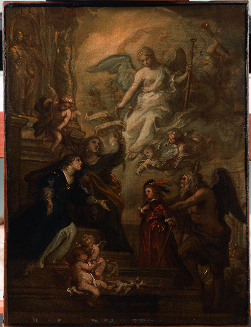 Theodoor van Thulden, Allegorie op prins Willem III als stamhouder van de dynastie, 1660-1661, olieverf op doek, 45 x 34 x 2 cm.